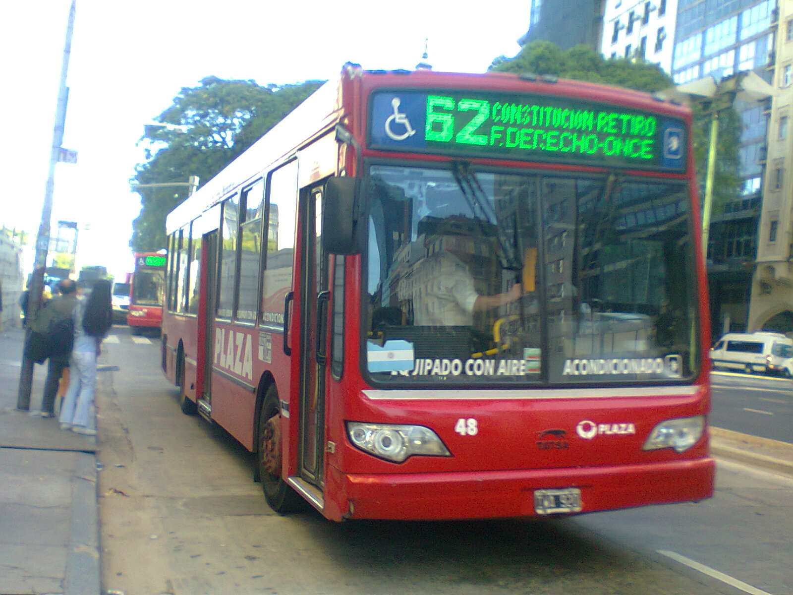 Unidad 48 de la línea 62 de Buenos Aires